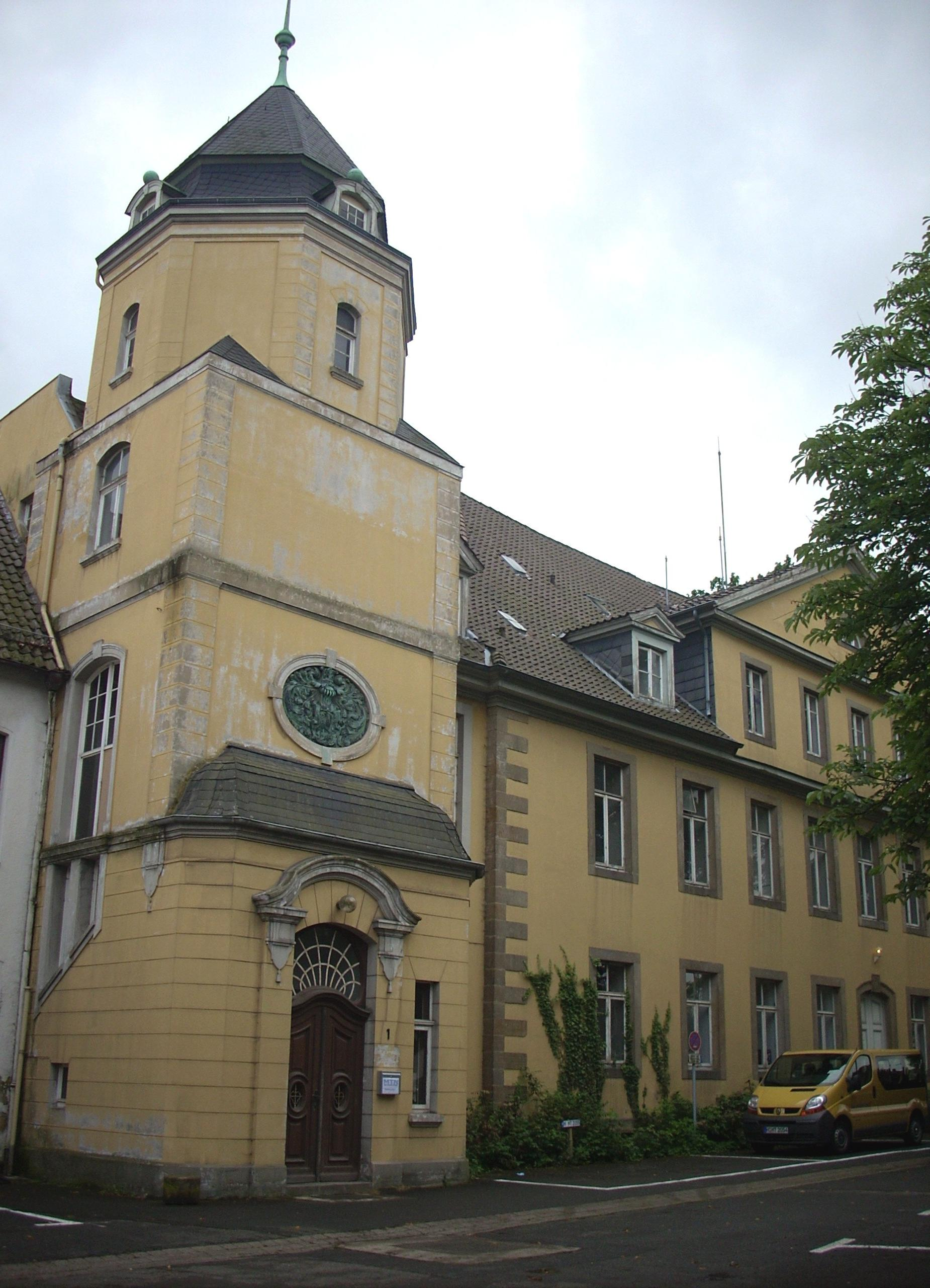 Ehem. Amtshaus Ilten, Sehnde, Germany